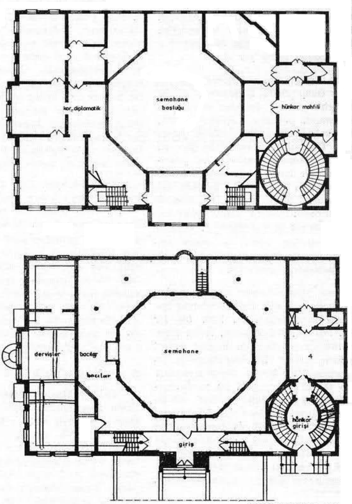 Galata Mevlevihanesi planı.